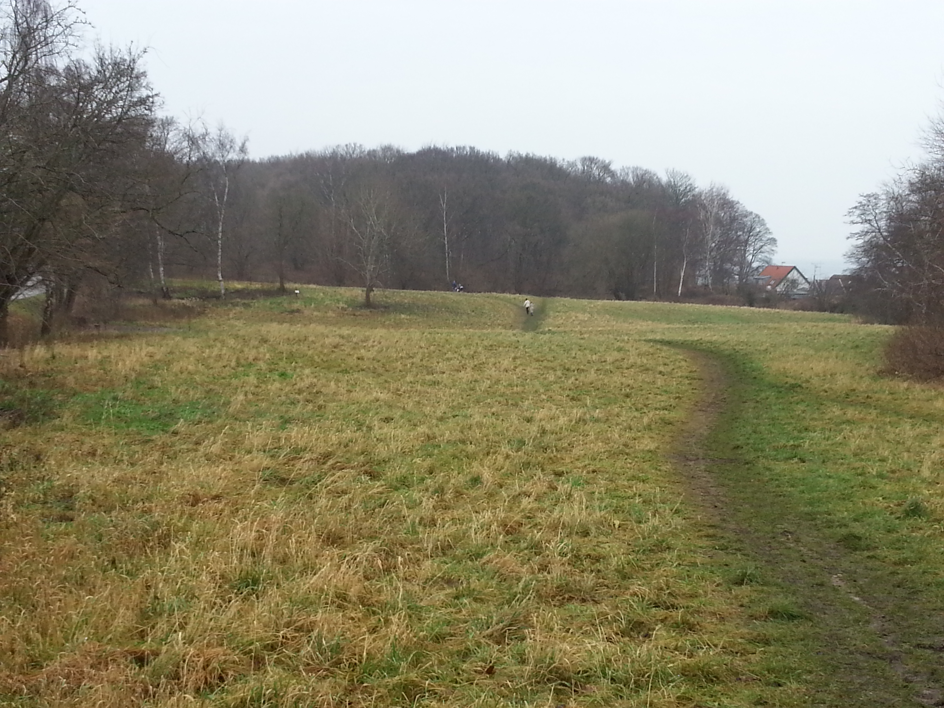 Udsigt mod Babylone skov ved Humlebæk